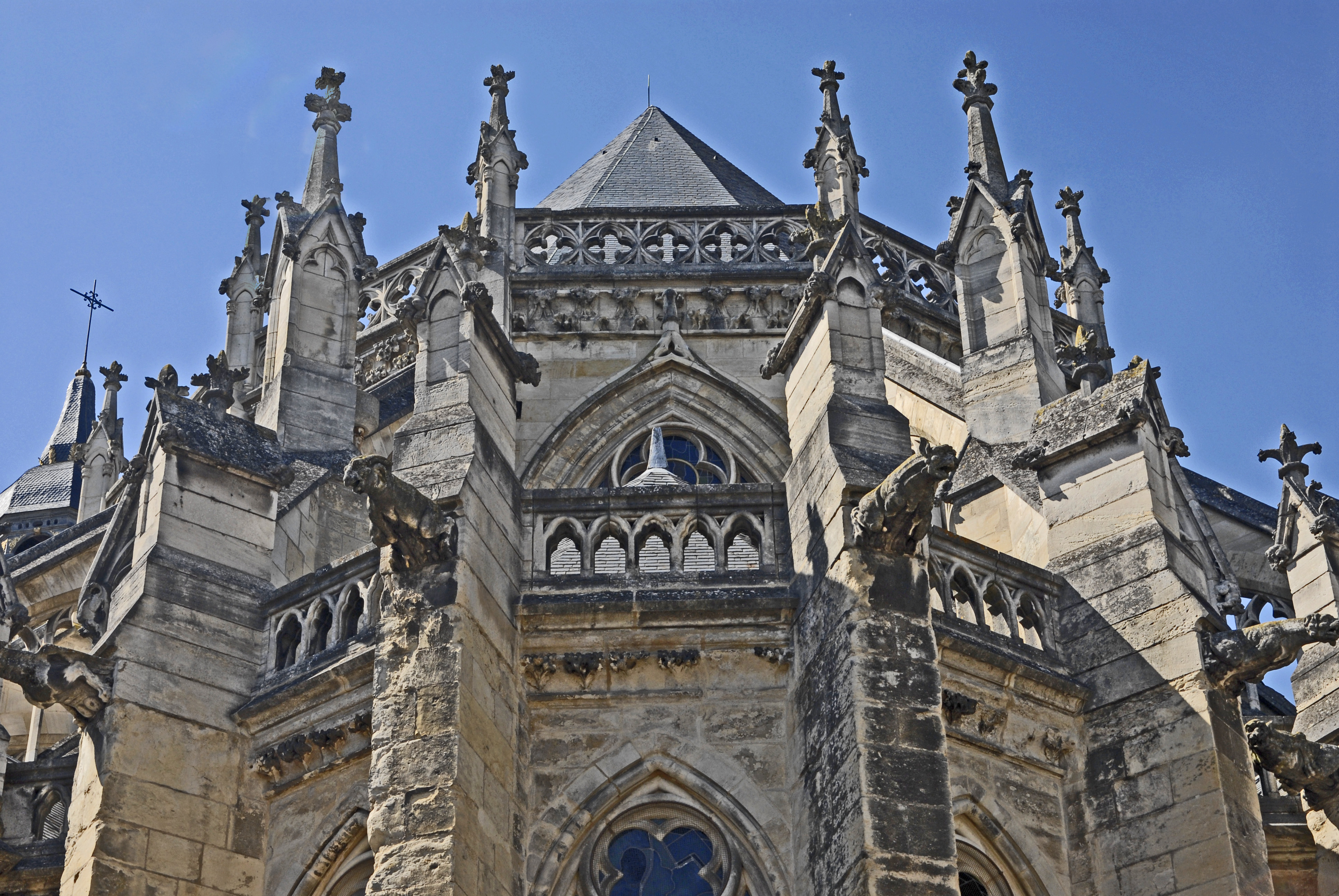 Ostchor, Strebewerk über Kapellenkranz